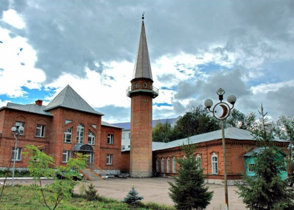 Мечеть соборная (Республика Башкортостан, Мелеуз, Смоленская улица, 36) автор фото неизвестен